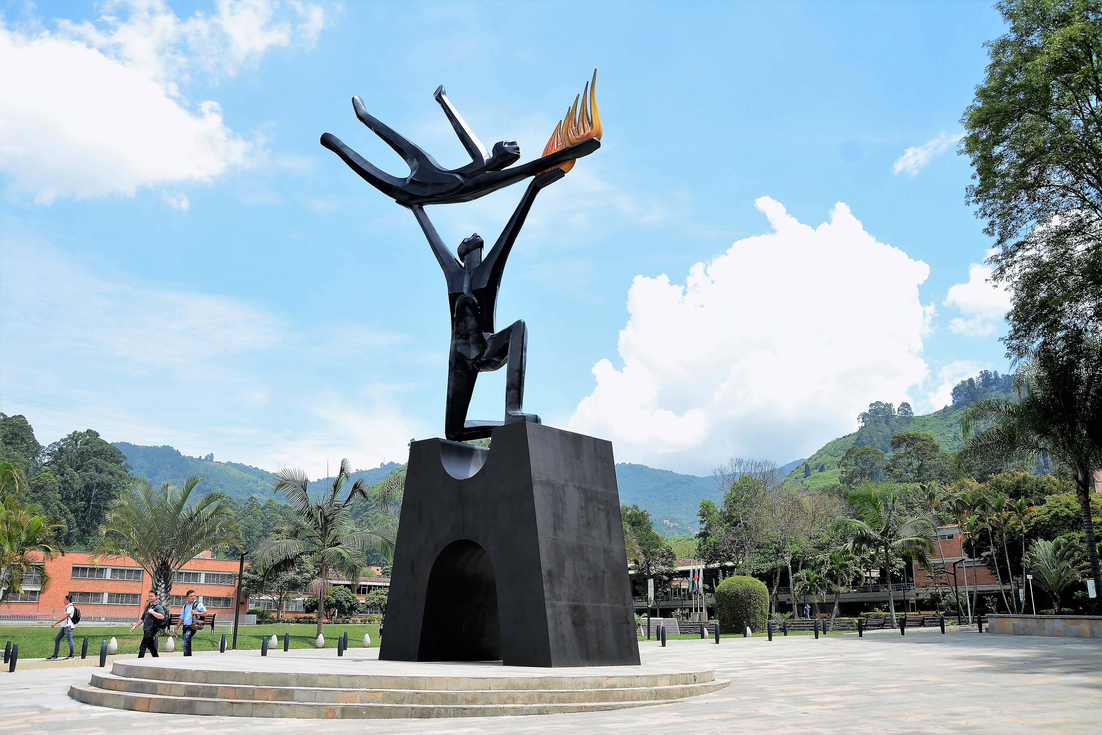 Fotografía de la Plaza de la Libertad, ubicada en la Universidad de Medellín, está precedida por la escultura de Prometeo, obra del maestro antioqueño Salvador Arango.